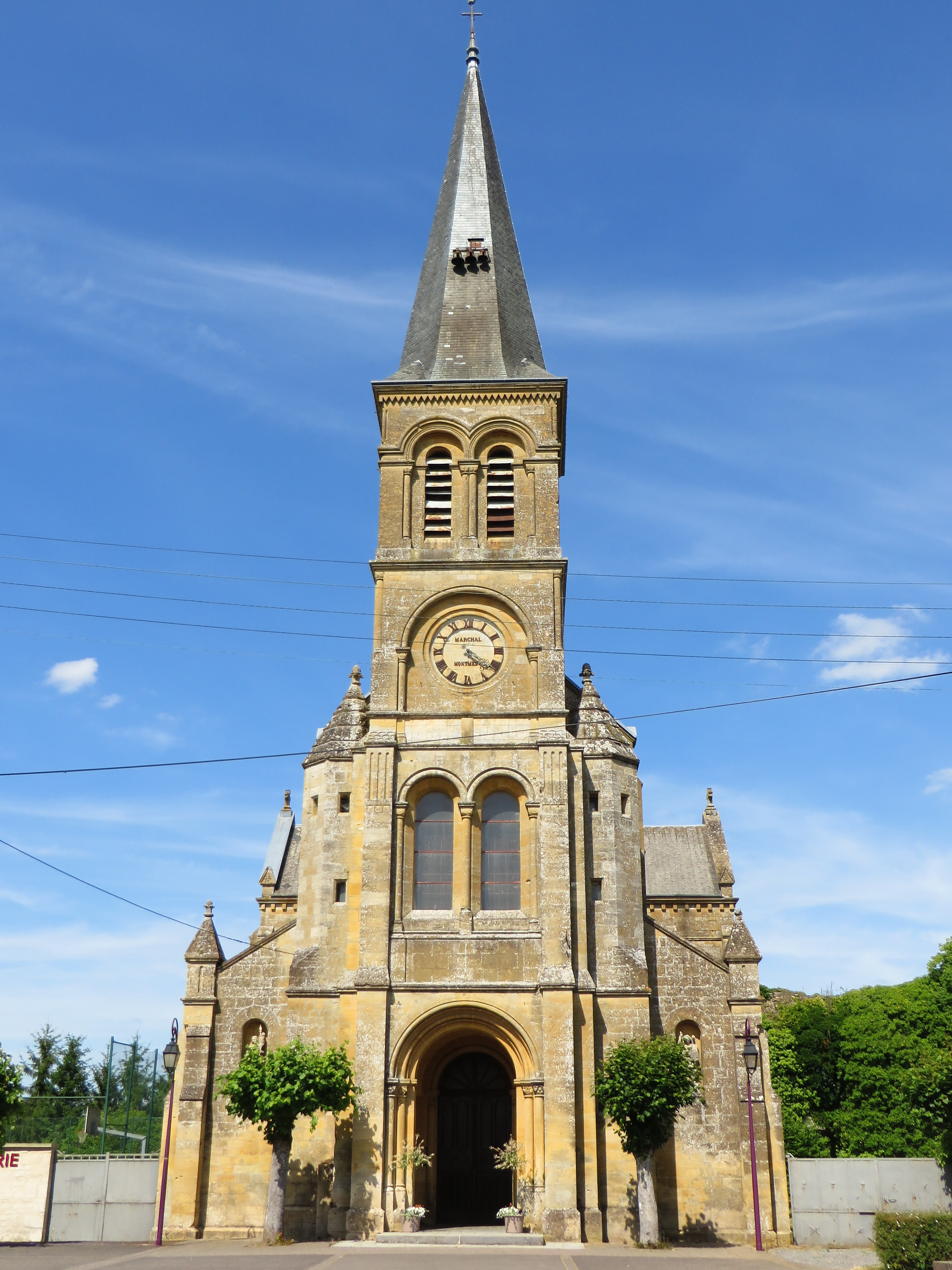 Louppy-sur-Loison L’église Saint-Martin